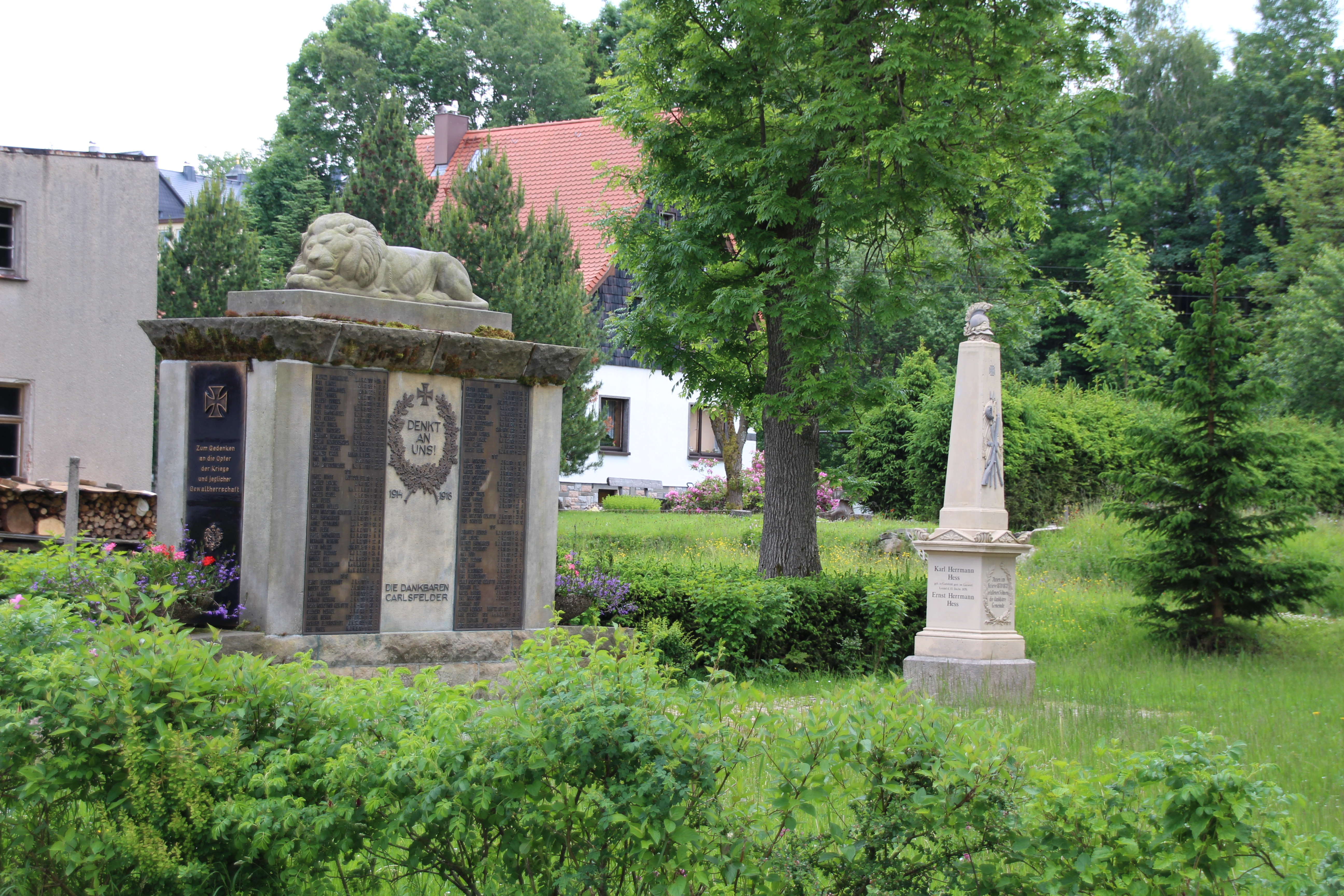 Carlsfeld: Im Dorf.